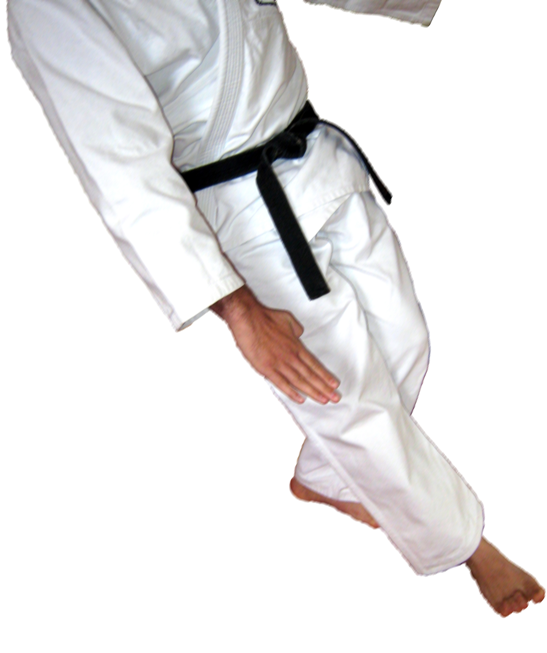 Yoko Ukemi, Seitwärtsrolle Judo, Seitwärtsfallübung